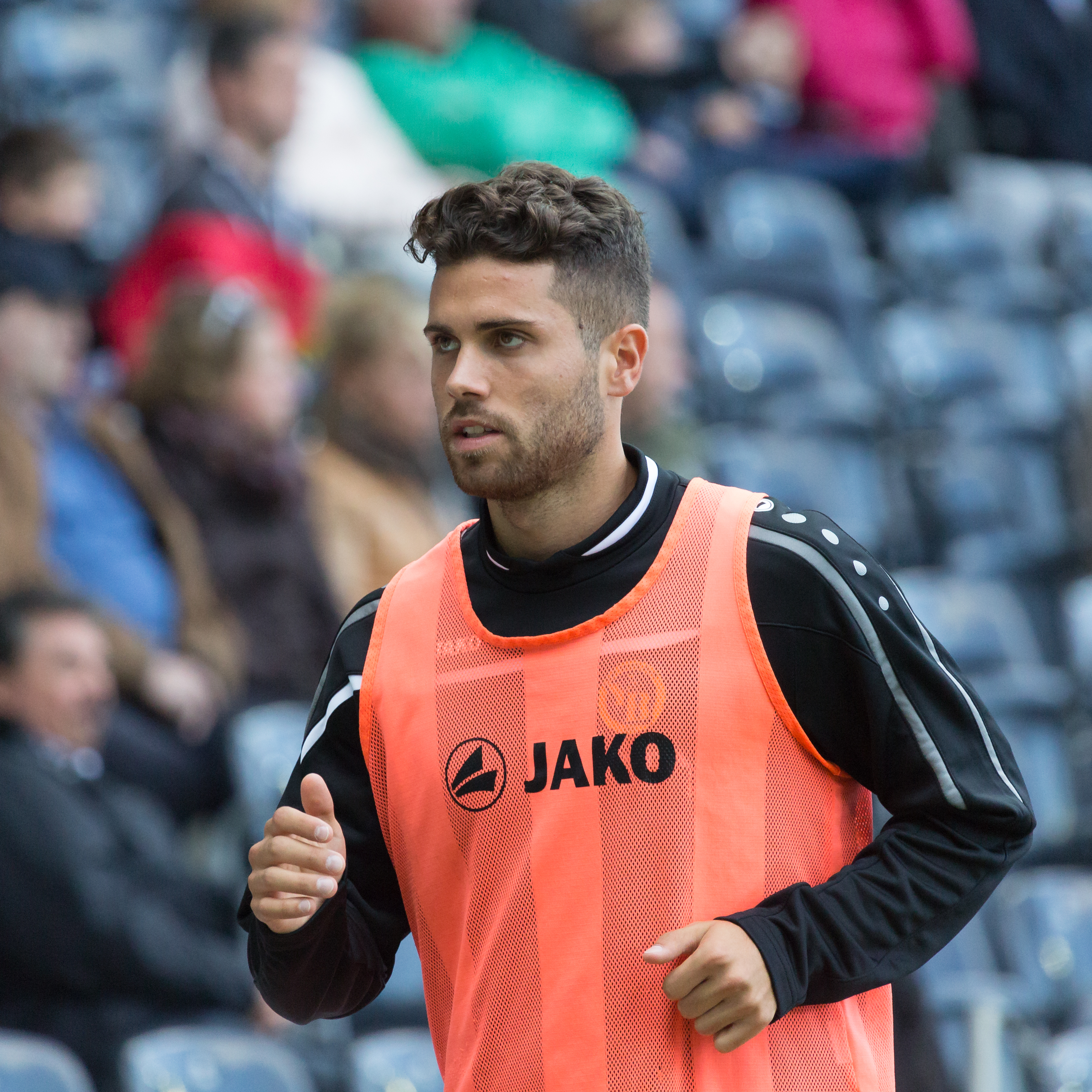 Leonardo Bertone beim Spiel des BSC Young Boys gegen den FC Luzern